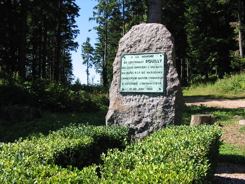 Monument érigé à la mémoire du lieutenant Rouilly, des sous-officiers et soldats du 21/ 23 R.I.F. tombés pour sauver l’honneur et retarder l’envahisseur (Col de Sainte-Marie aux Mines).